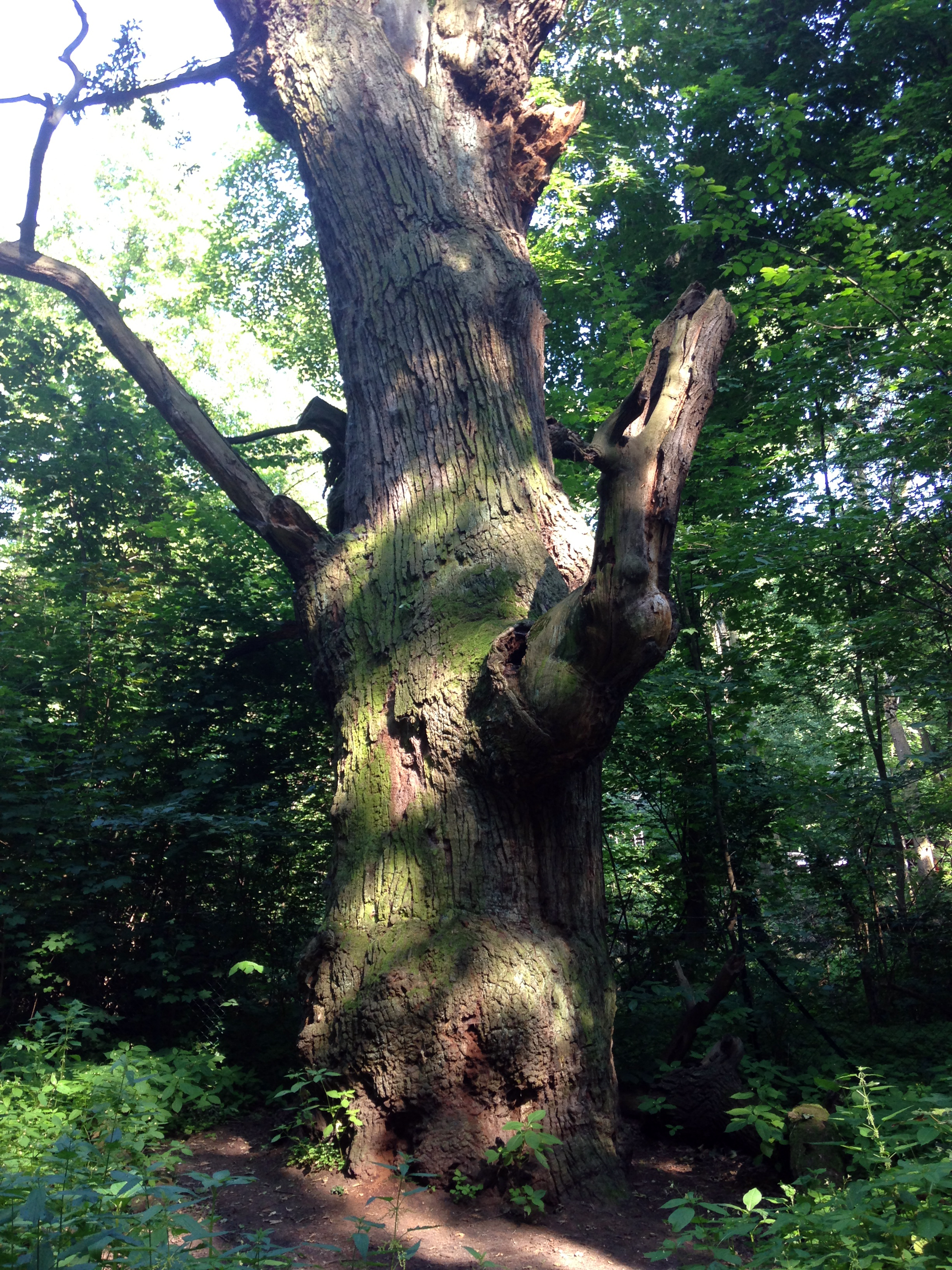 Berlin-Tegel, der Baum „Dicke Marie“, vermutlich der älteste Baum Berlins